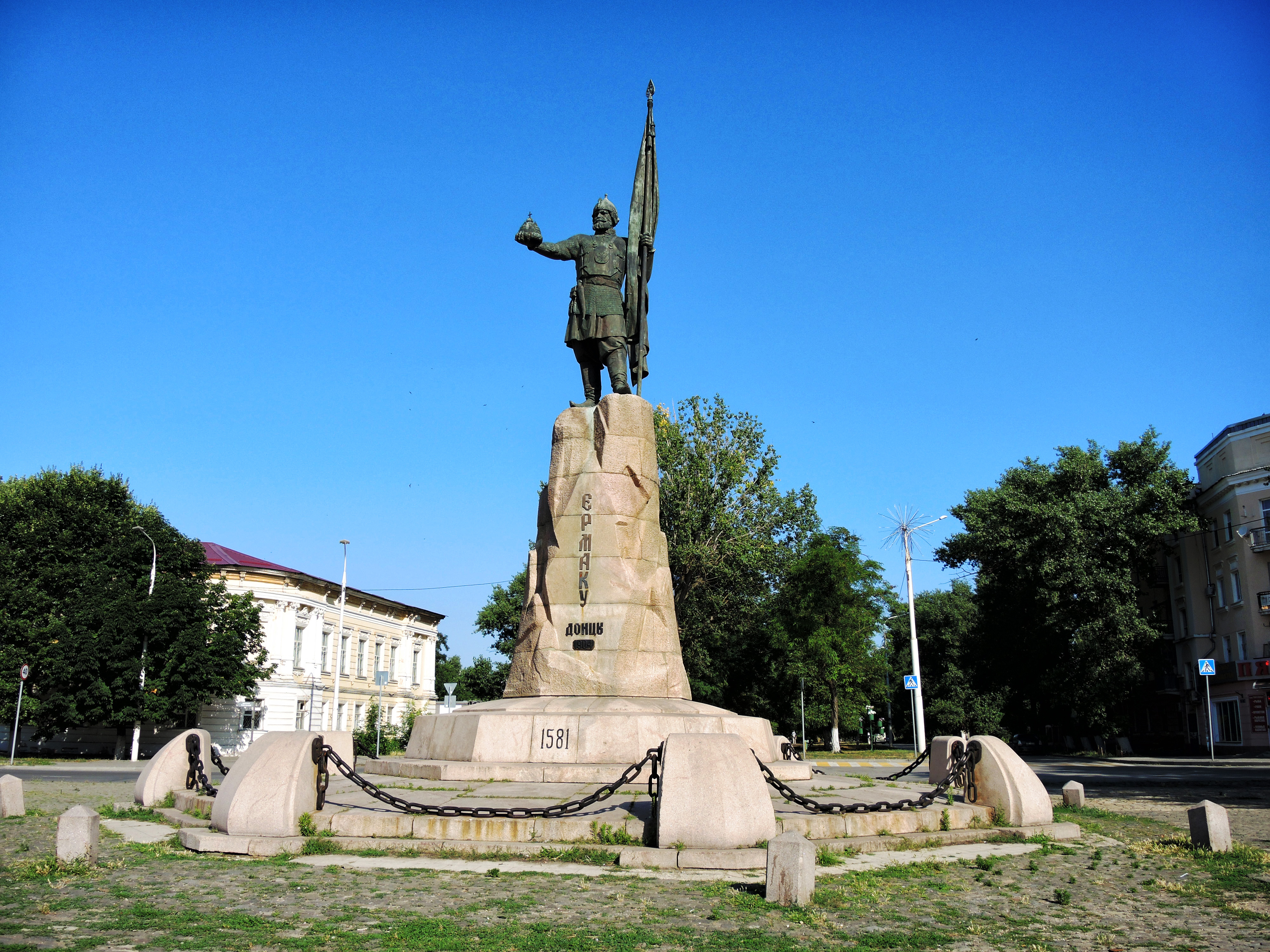 Памятник Ермаку: площадь Ермака, Новочеркасск, Ростовская область